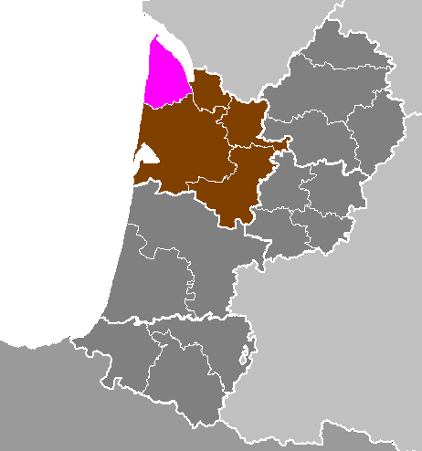 Maps of arrondissements and cantons of France: Département de la Gironde - Arrondissement de Lesparre-Médoc.PNG (Région Aquitaine)